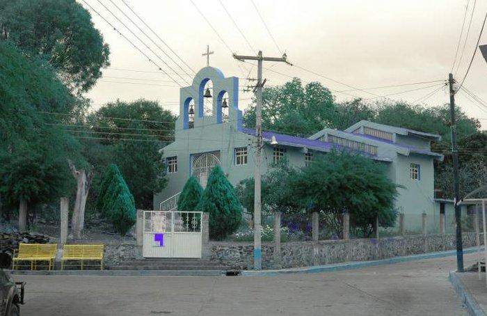 El charco en Uriangato